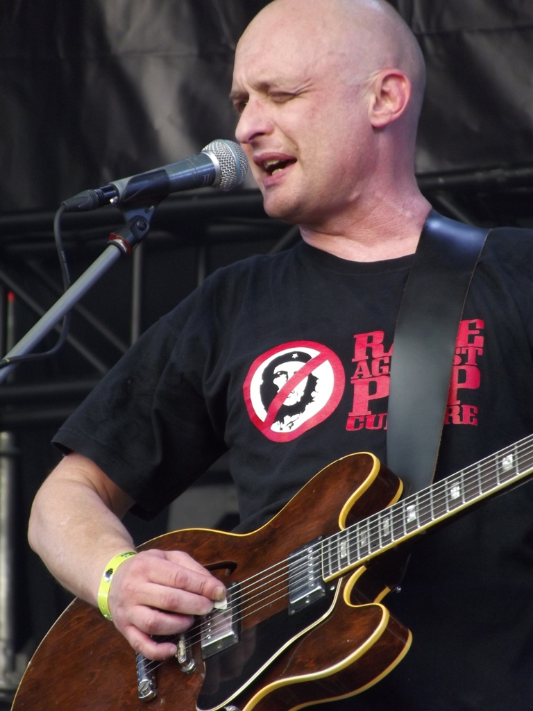 Zdjęcie zrobione podczas OFF Festival 2012 w Katowicach.